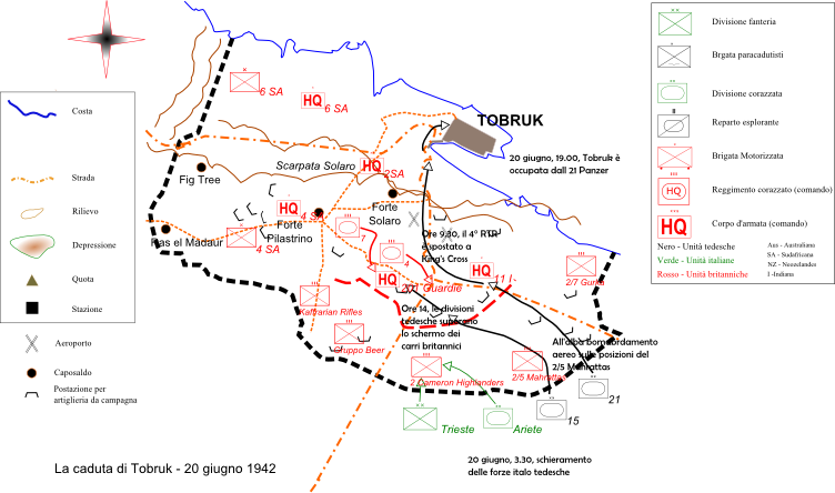 Mappa del combattimento per l'occupazione di Tobruk, 20 giugno 1942 Battle map of Tobruk fall combat, June 20 1942